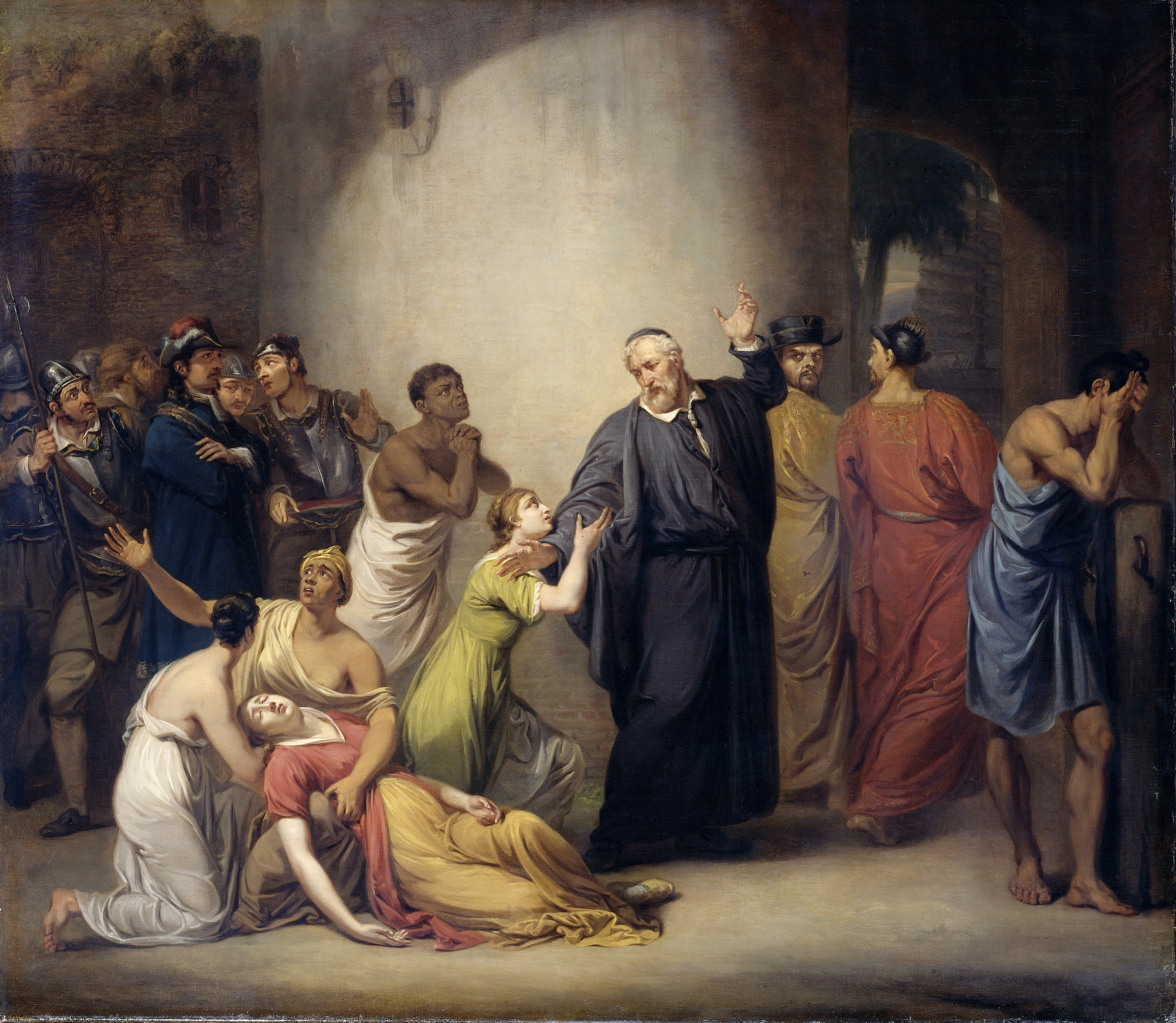 De zelfopoffering van predikant Hambroeck op Formosa (Taiwan), 24 mei 1661, Links de Nederlanders verschanst in het fort Zeelandia, waaronder zijn twee dochters, door Hambroeck aangespoord tot volharding. Rechts enkele van de Chinese begeleiders.